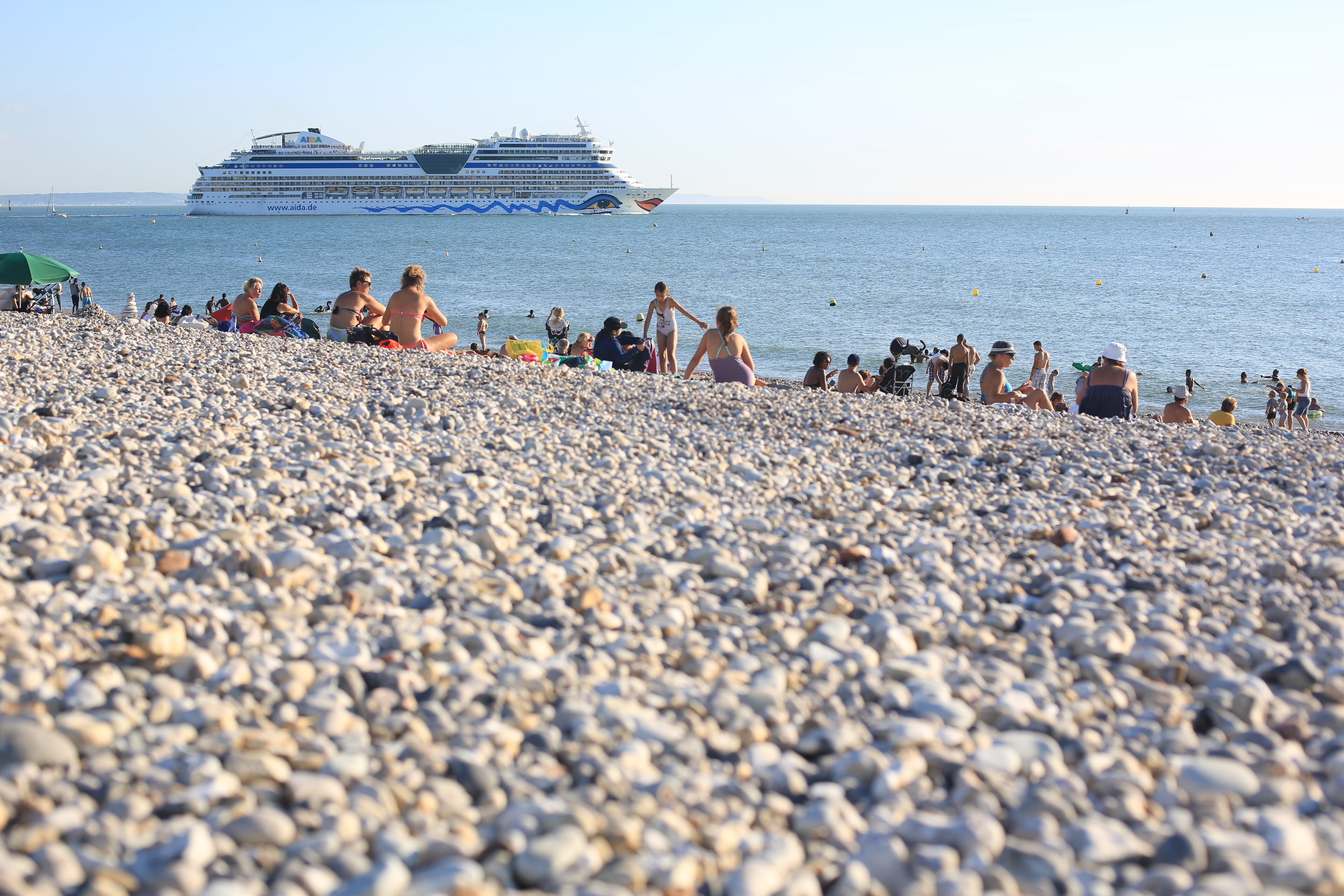 Le Havre, port d'escale incontournable avec140 escales programmées et 420 000 croisiéristes attendus en 2018.